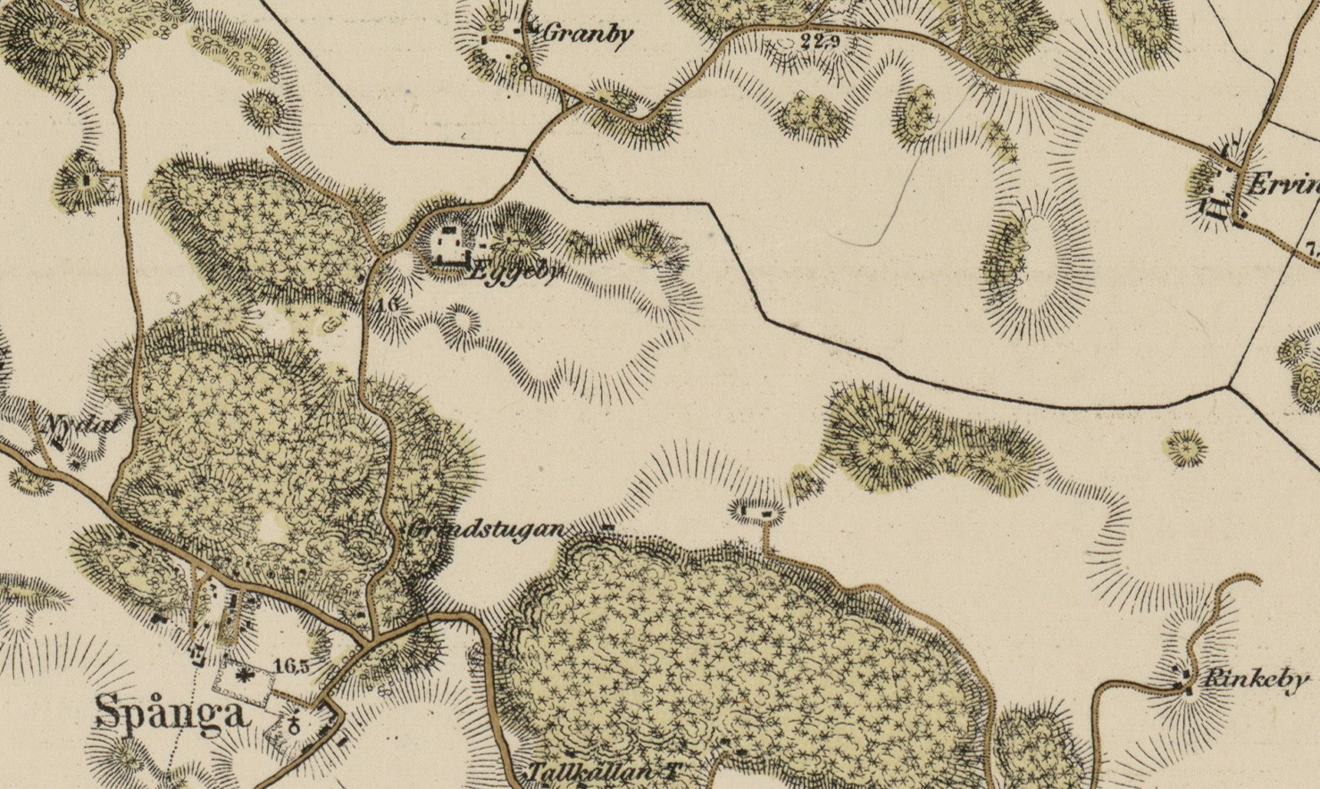 Del av Topografiska corpsens karta visande Eggeby Spånga Rinkeby